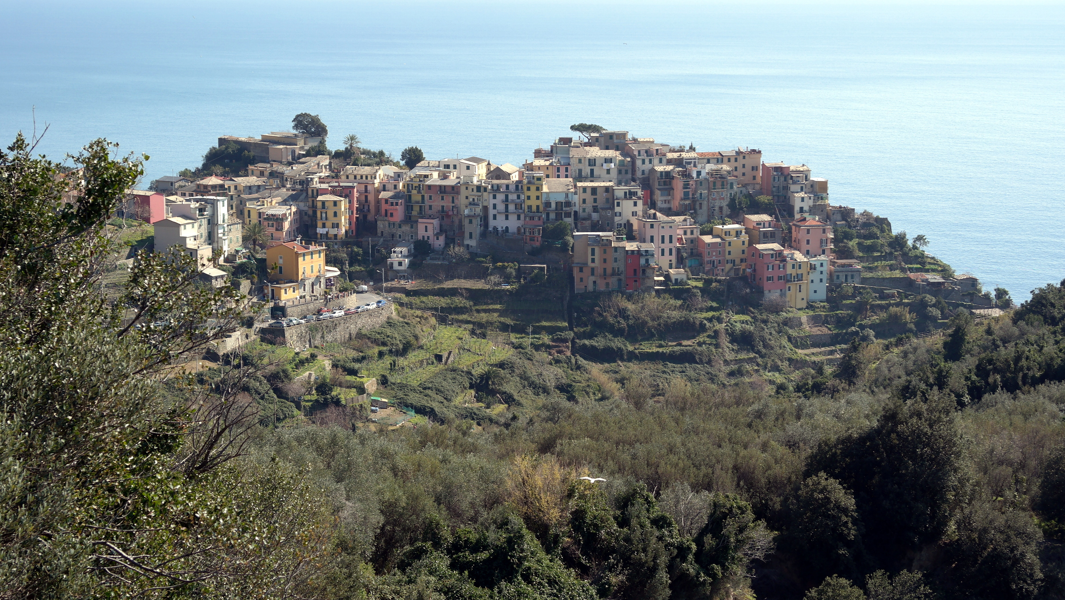 Veduta di Corniglia dal sentiero che la collega con Vernazza